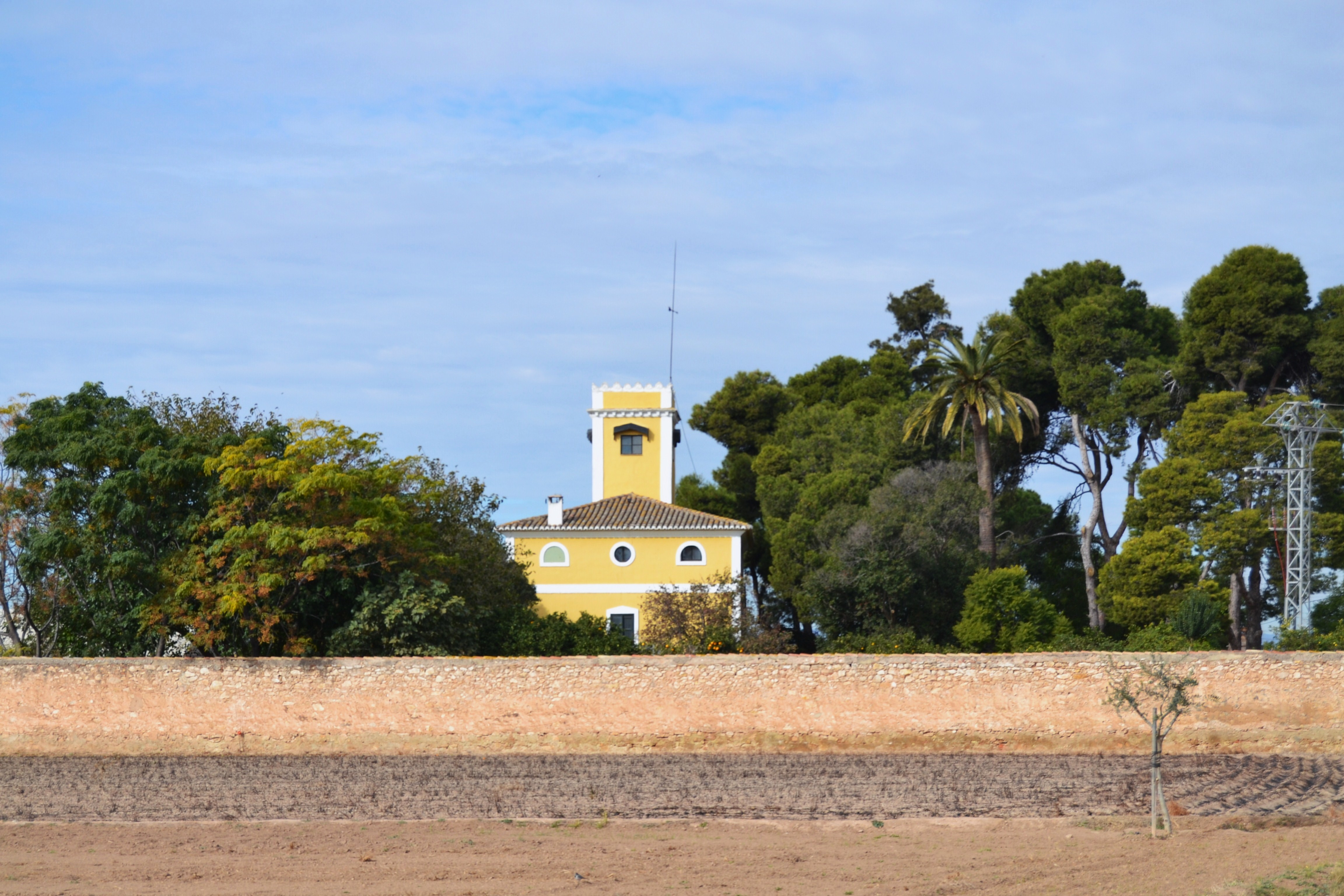 Vista de l'alqueria del Pi o nova de sant Josep.